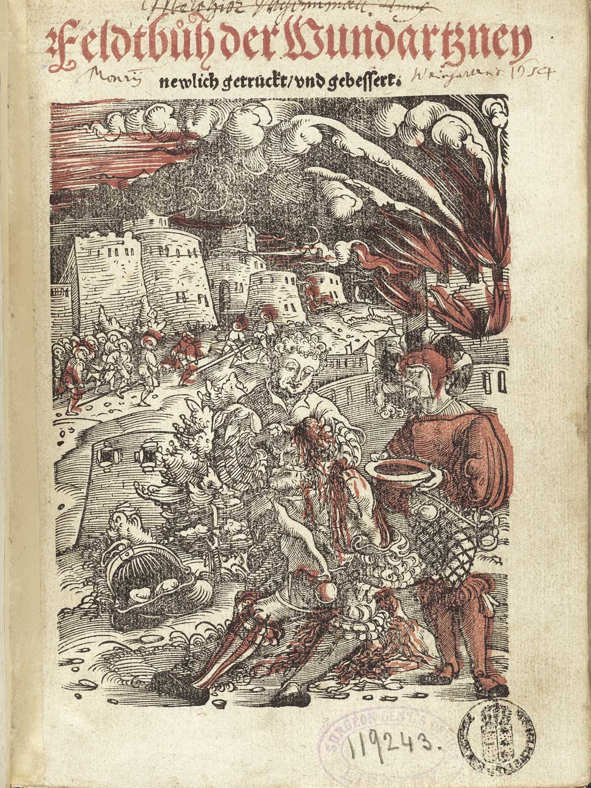 Hans von Gersdorff (ca. 1455 - 1529):„Feldbuch der Wundarzney“ . Uploader=Kuebi 08:21, 5 April 2007 (UTC)